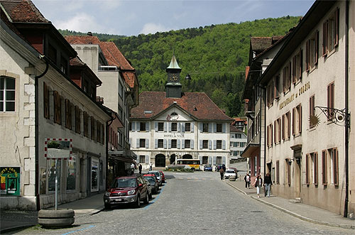 Moutier: Hôtel de ville